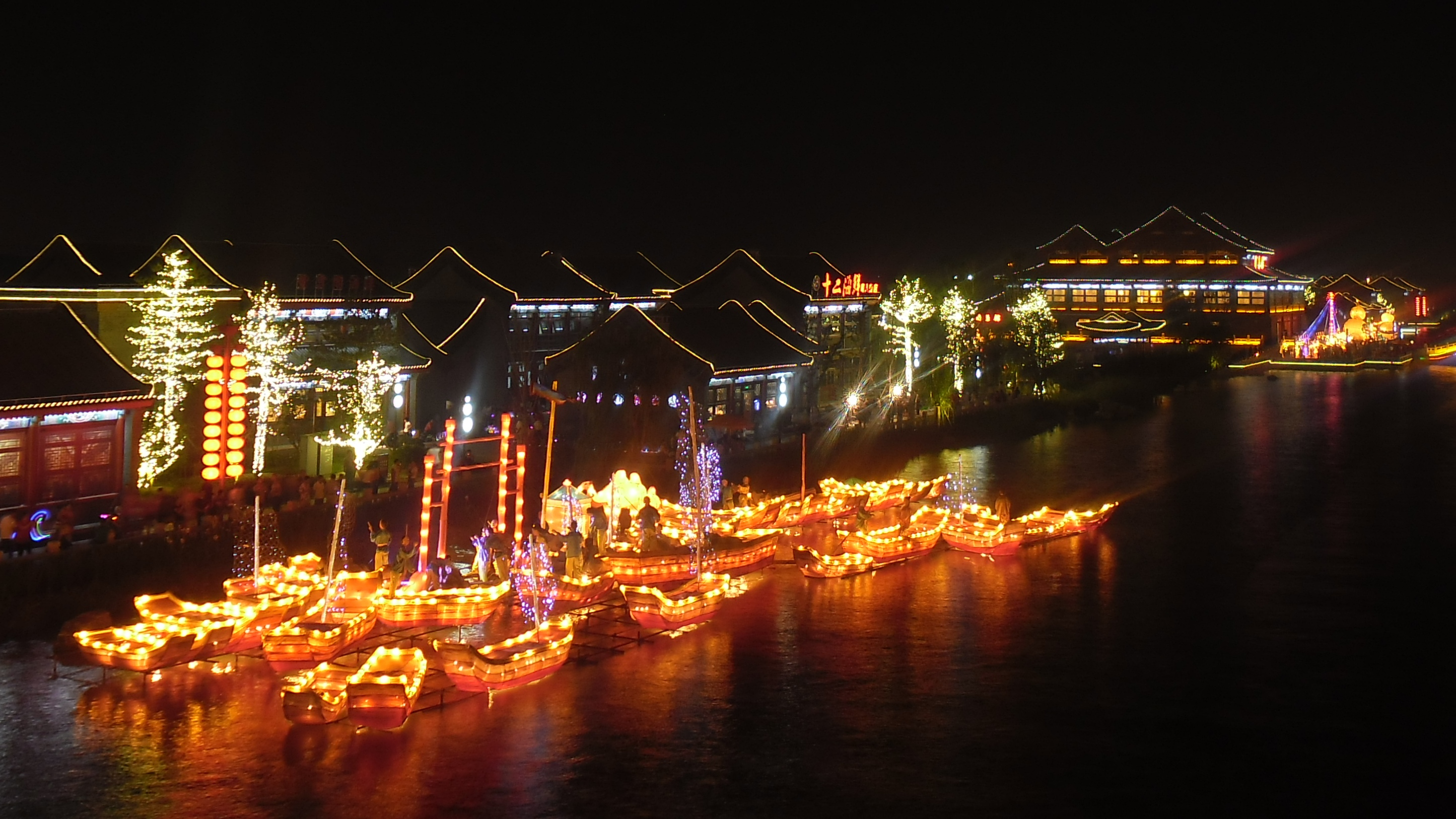 中文（中国大陆）: 唐津运河唐人街-船灯夜景鸟瞰